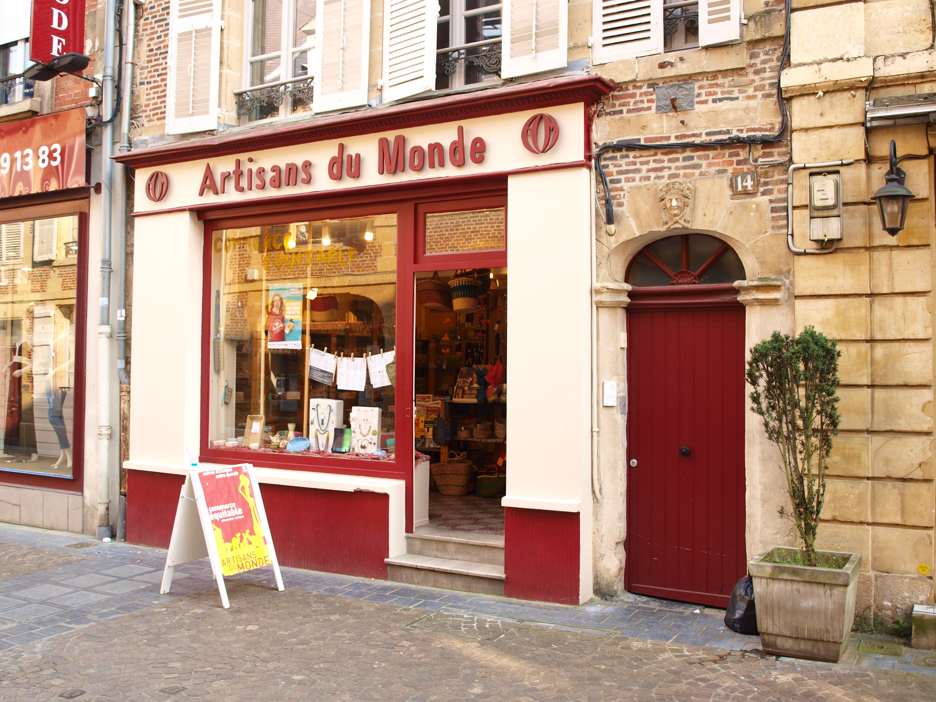 Commerce de Charleville-Mézières (Ardennes, France)